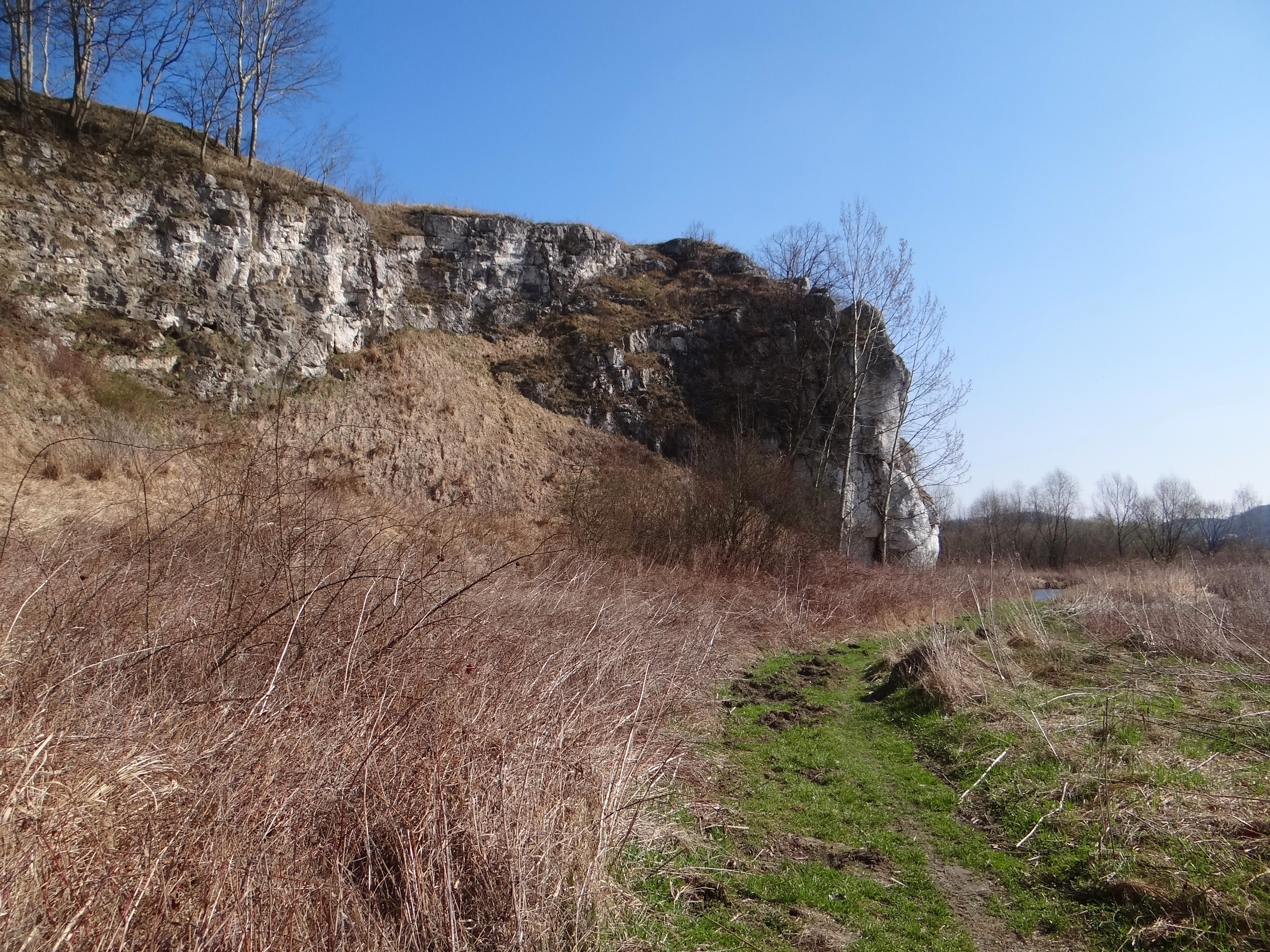 Okrążek w grupie SkałekPiekarskich